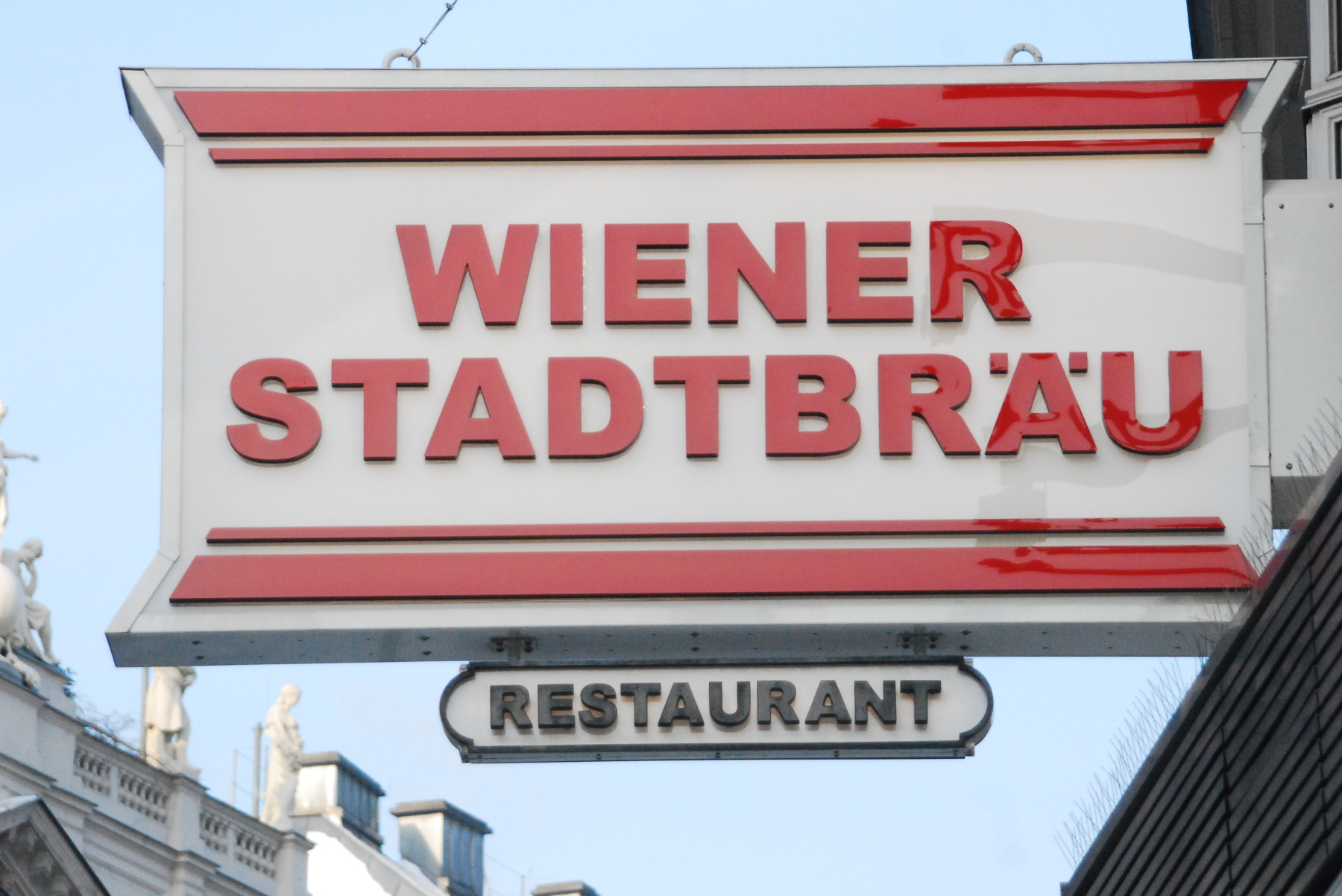 Stadtbräu, ehemalige Brauerei der Stadt Wien